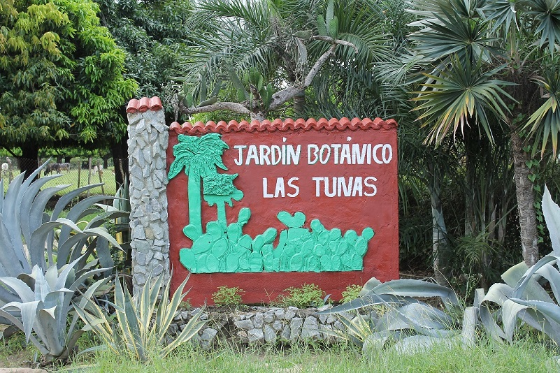 Mural de entrada del Jardín Botánico Las Tunas